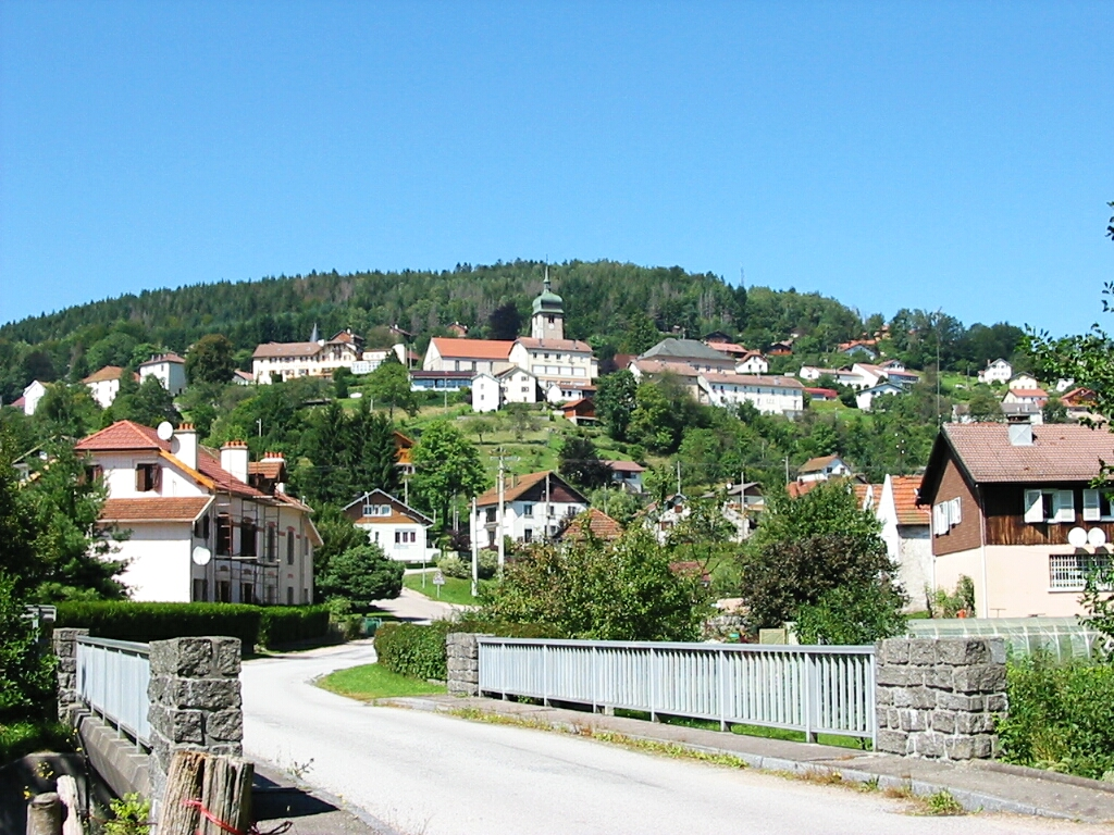 Le Tholy (département des Vosges, France). Vue depuis le pont sur la Cleurie.